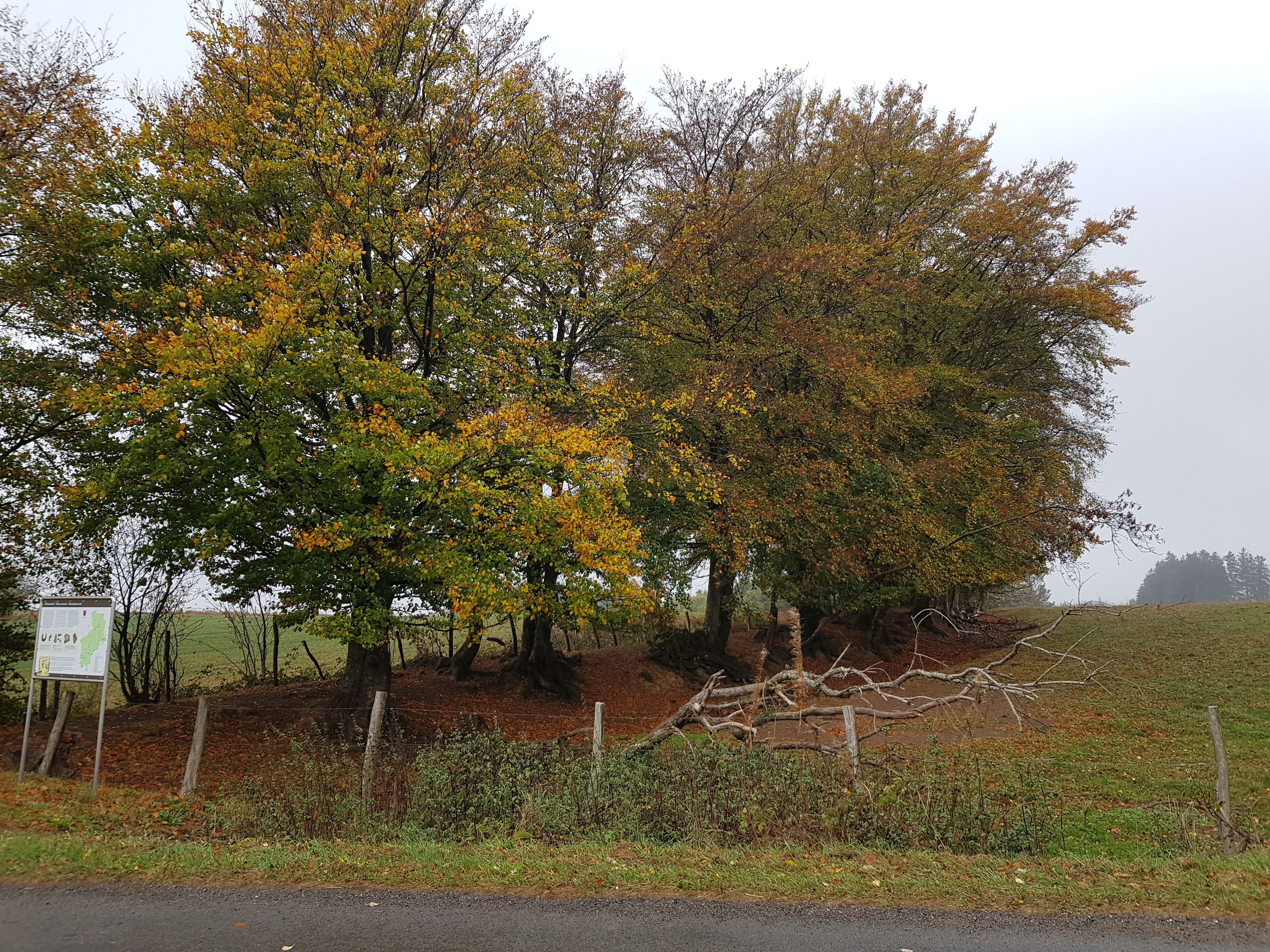 Römerwall, Holzheim, Büllingen, Belgien This photo of immovable heritage has been taken in the Walloon Region